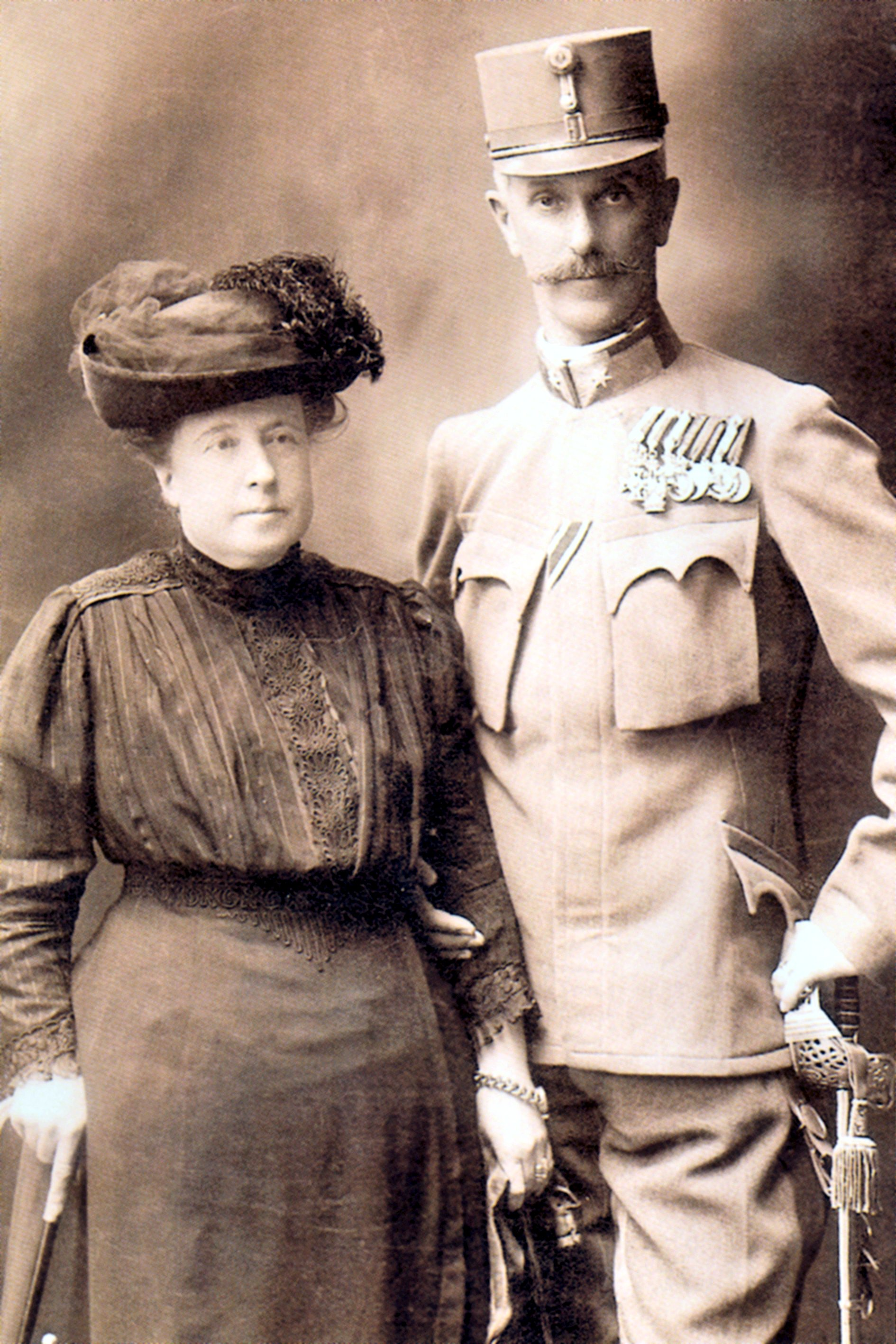 Gabriel Graf Marenzi, Gattin Gabriele Gräfin von Harrach